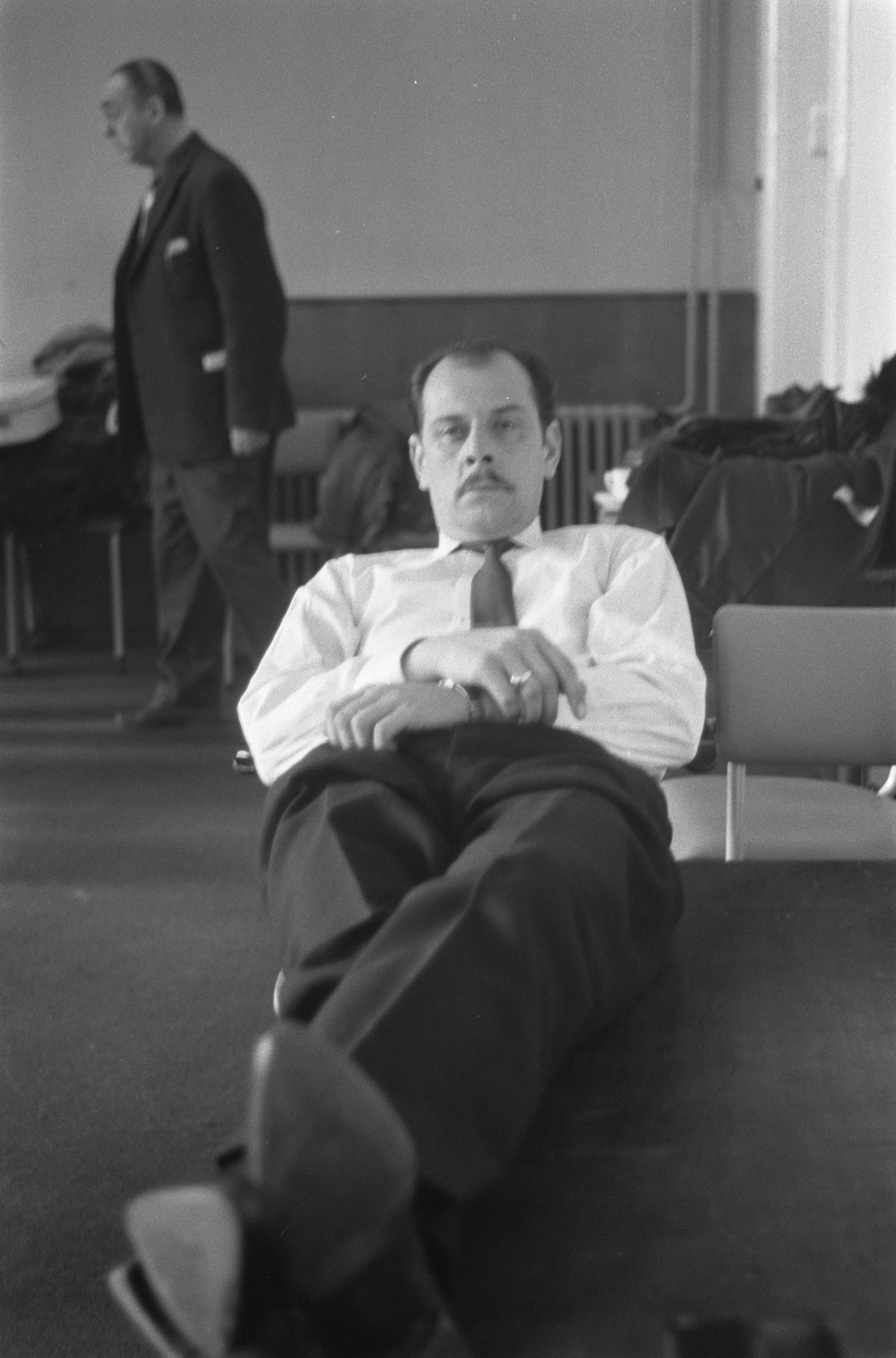 Collectie / Archief : Fotocollectie Anefo Reportage / Serie : [ onbekend ] Beschrijving : Repetities "Dreigroschenopern" in de Kroon te Amsterdam Datum : 28 oktober 1960 Locatie : Amsterdam, Noord-Holland Trefwoorden : REPETITIES Persoonsnaam : KROON Fotograaf : Pot, Harry / Anefo Auteursrechthebbende : Nationaal Archief Materiaalsoort : Negatief (zwart/wit) Nummer archiefinventaris : bekijk toegang 2.24.01.05 Bestanddeelnummer : 911-7232